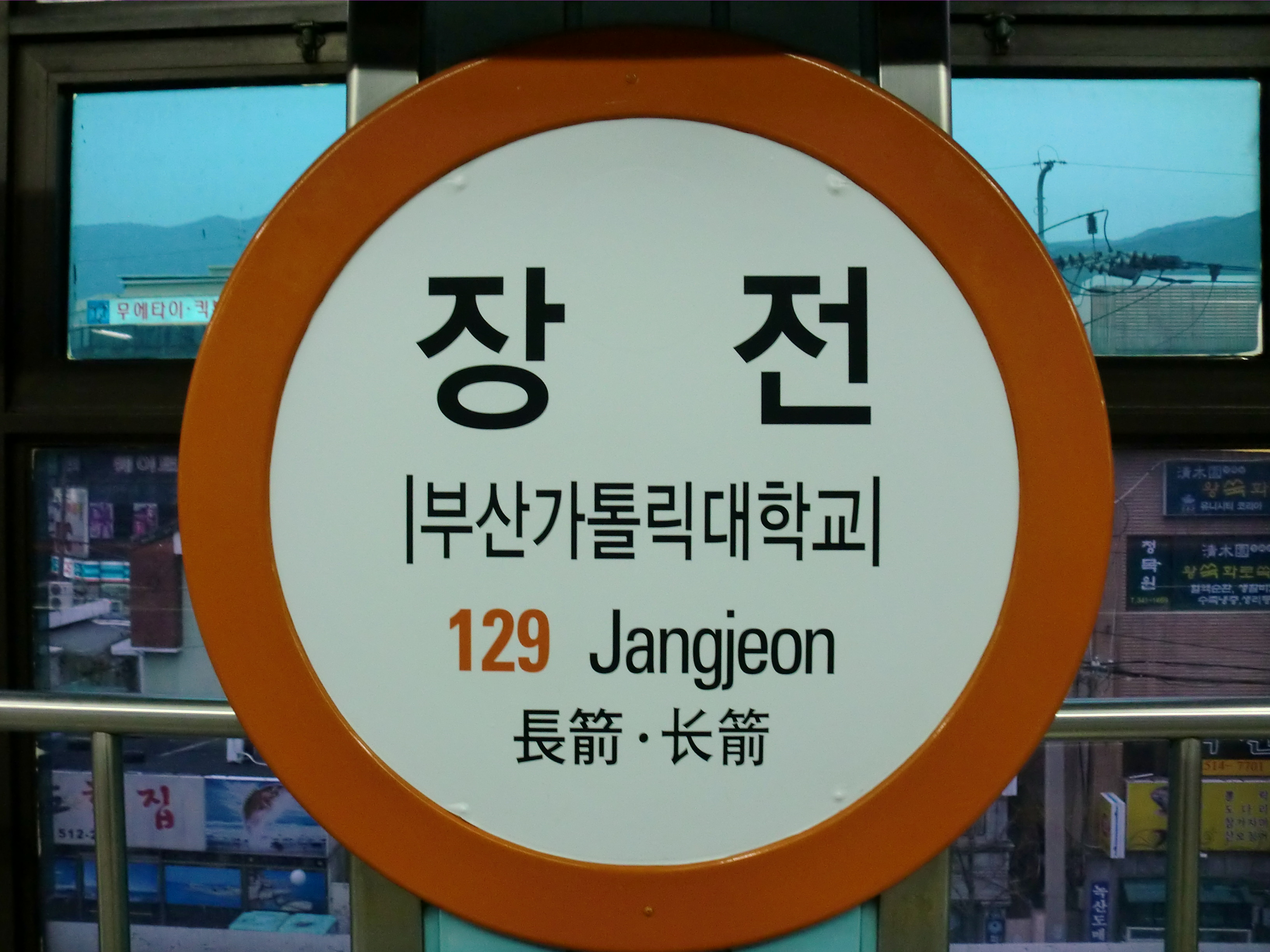 부산도시철도 1호선 장전역의 역명판